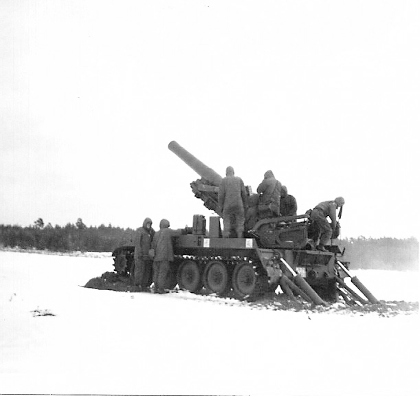 4./- bei Übungsschießen mit M110, TrÜbPl Munster-Süd, Winter 1970/71